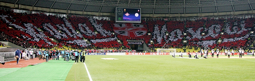 Перфоманс "Spartak Moscow" на матче с амстердамским "Аяксом". 2011 год